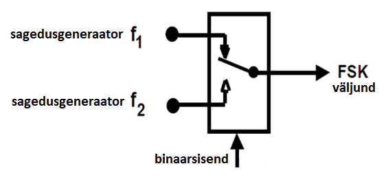 lihtsa binaarse FSK modulaatori põhimõtteskeem